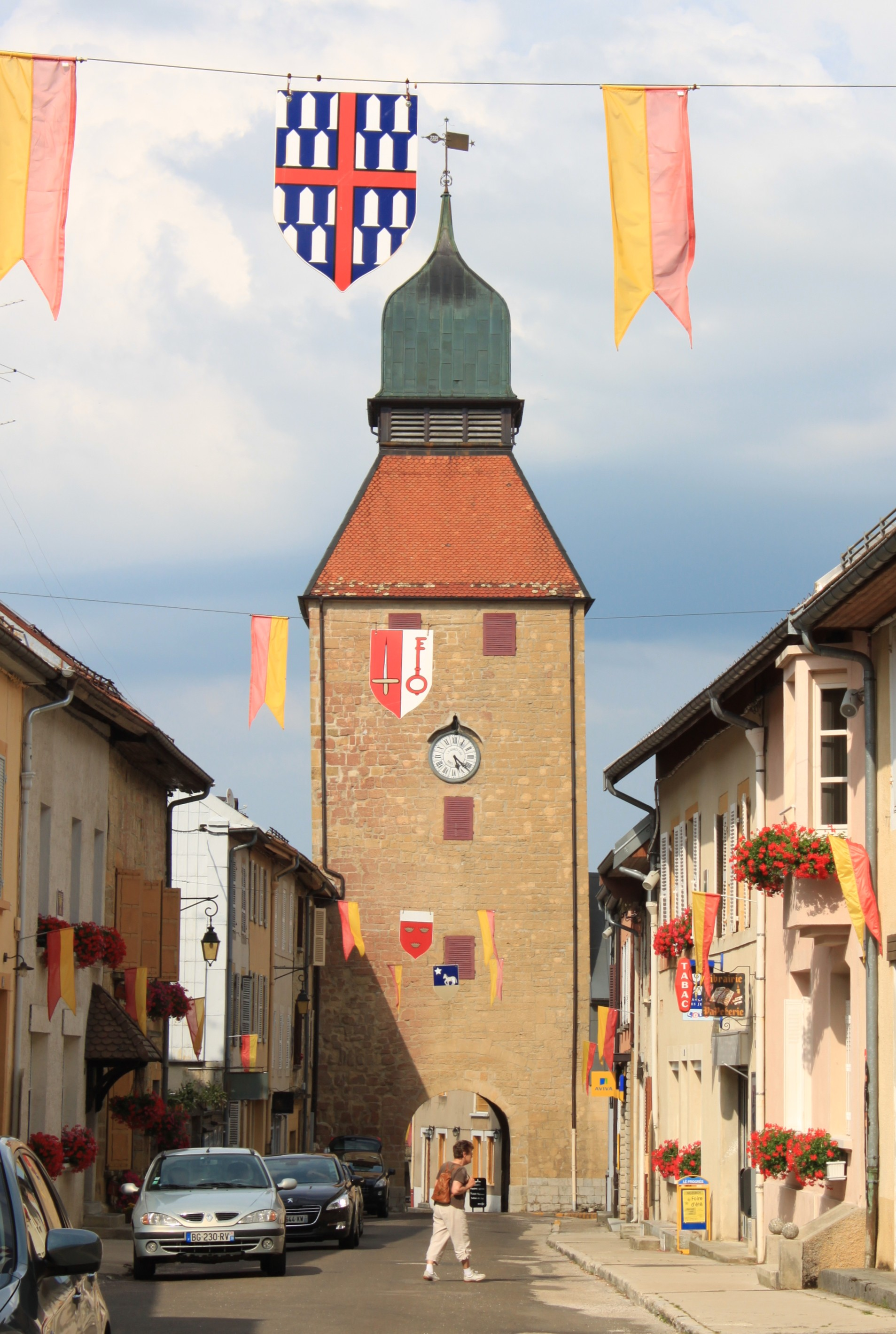 Nozeroy, Jura, Franche-Comté, France